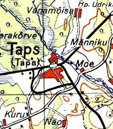 Железнодорожный узел "Тапа" на карте 1941 года. Издание немецкого генштаба Люфтваффе (Generalstabes der Luftwaffe), 3-х километровка. Видна железнодорожная ветка вокруг города.